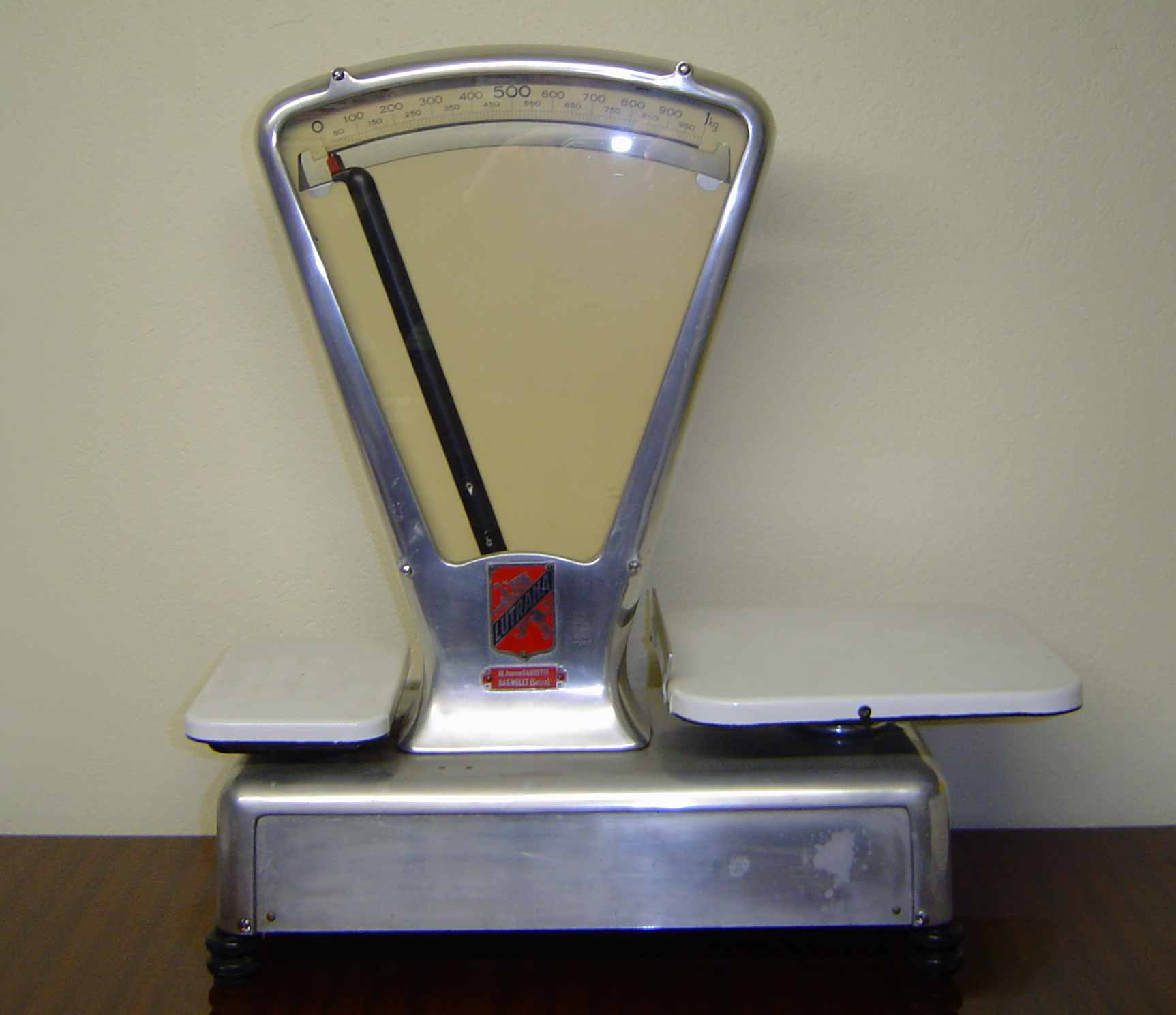 Photo de ma collection de poids et balances